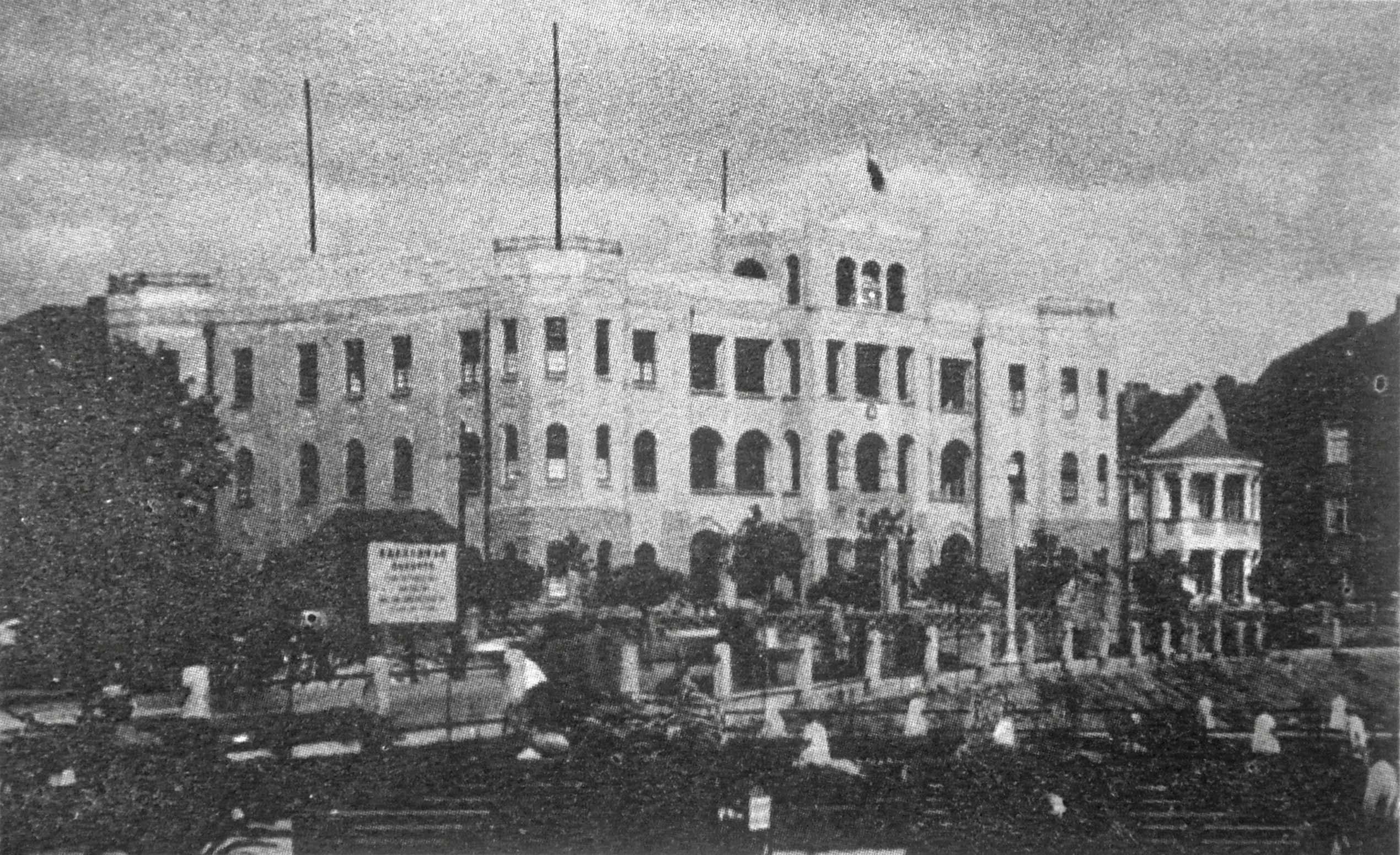 中央银行青岛分行大楼，原中国国民党青岛市党部大楼。